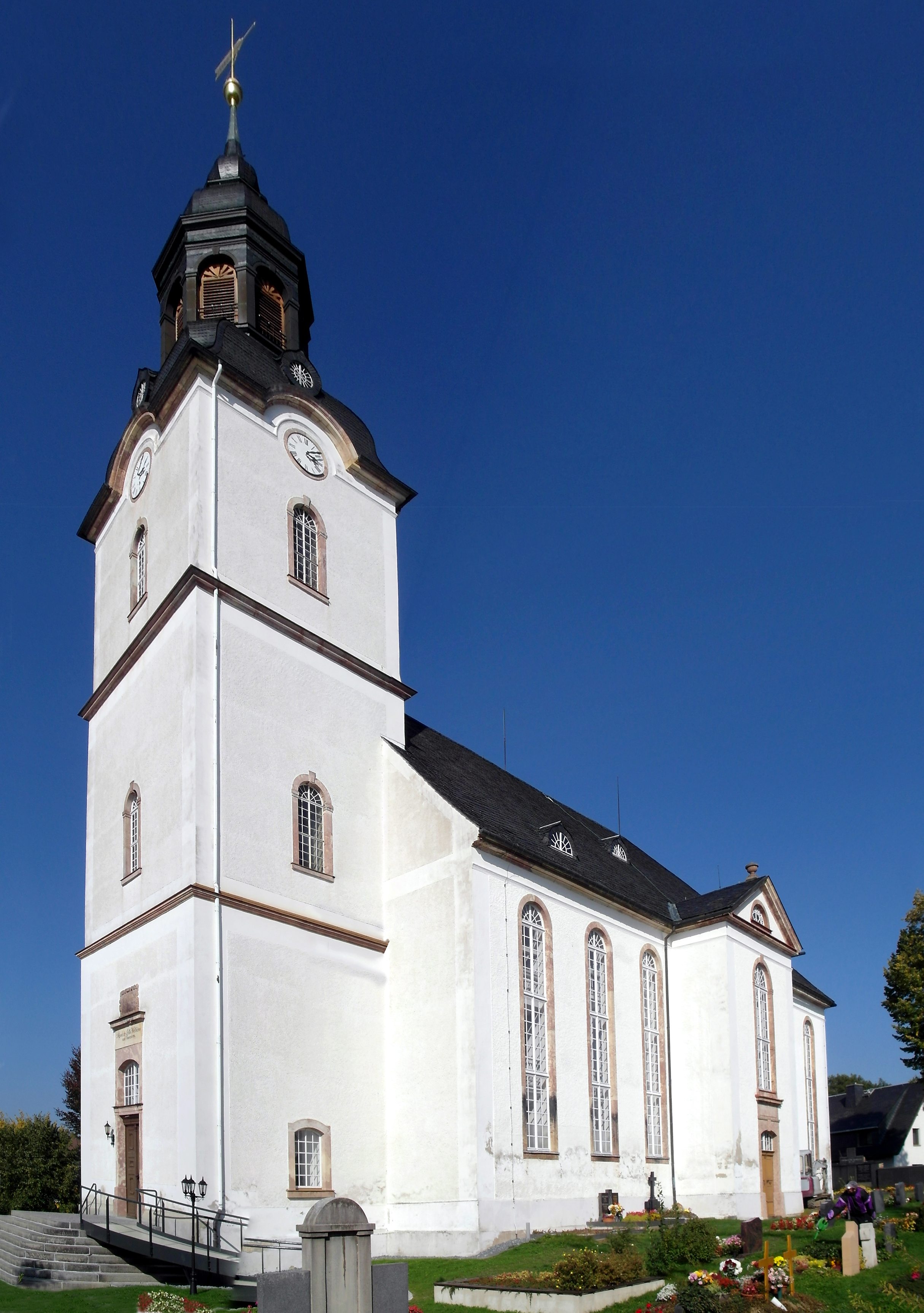 29.09.2017 09430 Drebach, Venusberger Straße (GMP: 50.688598,13.031555): Kirche Drebach, Neubau nach Brand der Vorgängerkirche durch Maurermeister Drechsel aus Drebach und den Zimmerermeister Chr. Friedrich Uhlig aus Altenhain. Weihe am Reformationstag 1825. Sicht von Südwesten.[DSCN2193+95.JPG]20170929200MDR.JPG(c)Blobelt